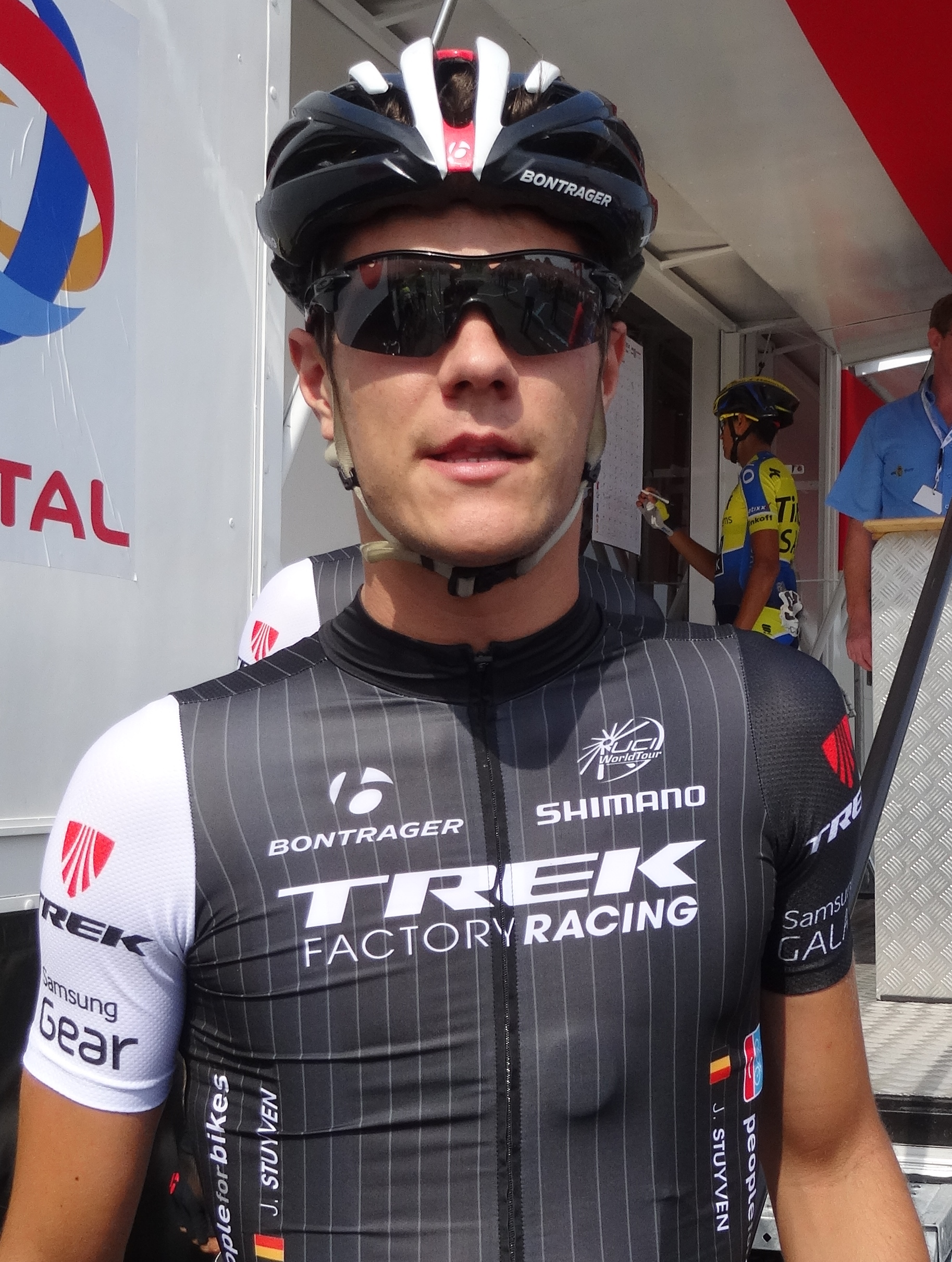 Reportage photographique réalisé le dimanche 27 juillet à l'occasion du départ de la deuxième étape du Tour de Wallonie 2014 à Péronnes-lez-Antoing (Antoing), Belgique.